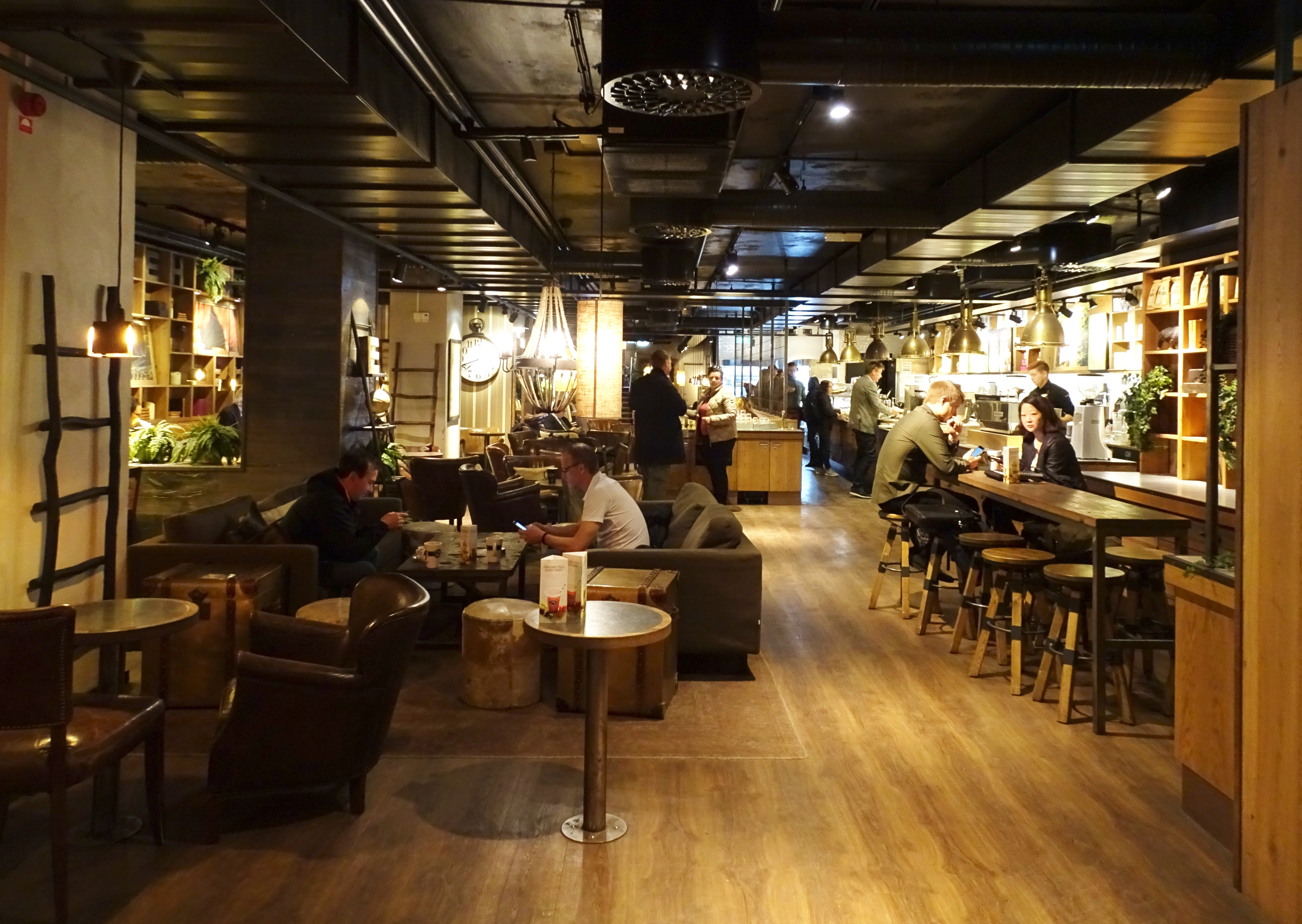 Espresso house i Konserthuset